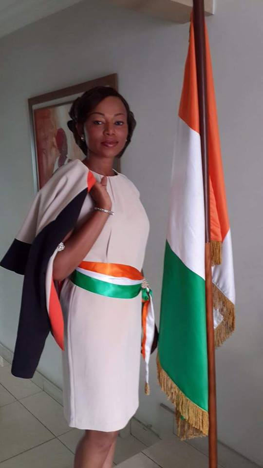 Photo officielle de Nasseneba Touré, Maire de la Commune d'Odienné